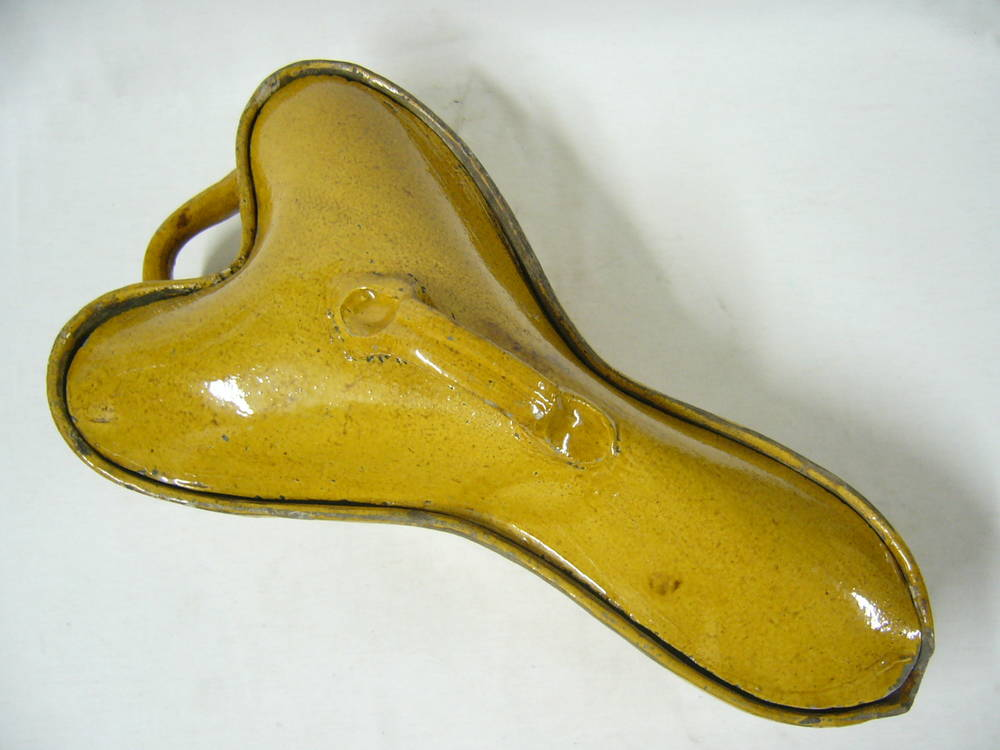 Hasenpfanne aus Steinzeug gelb, Deutschland um 1810 11,5 - 20 x 52 x 13 - 29 cm